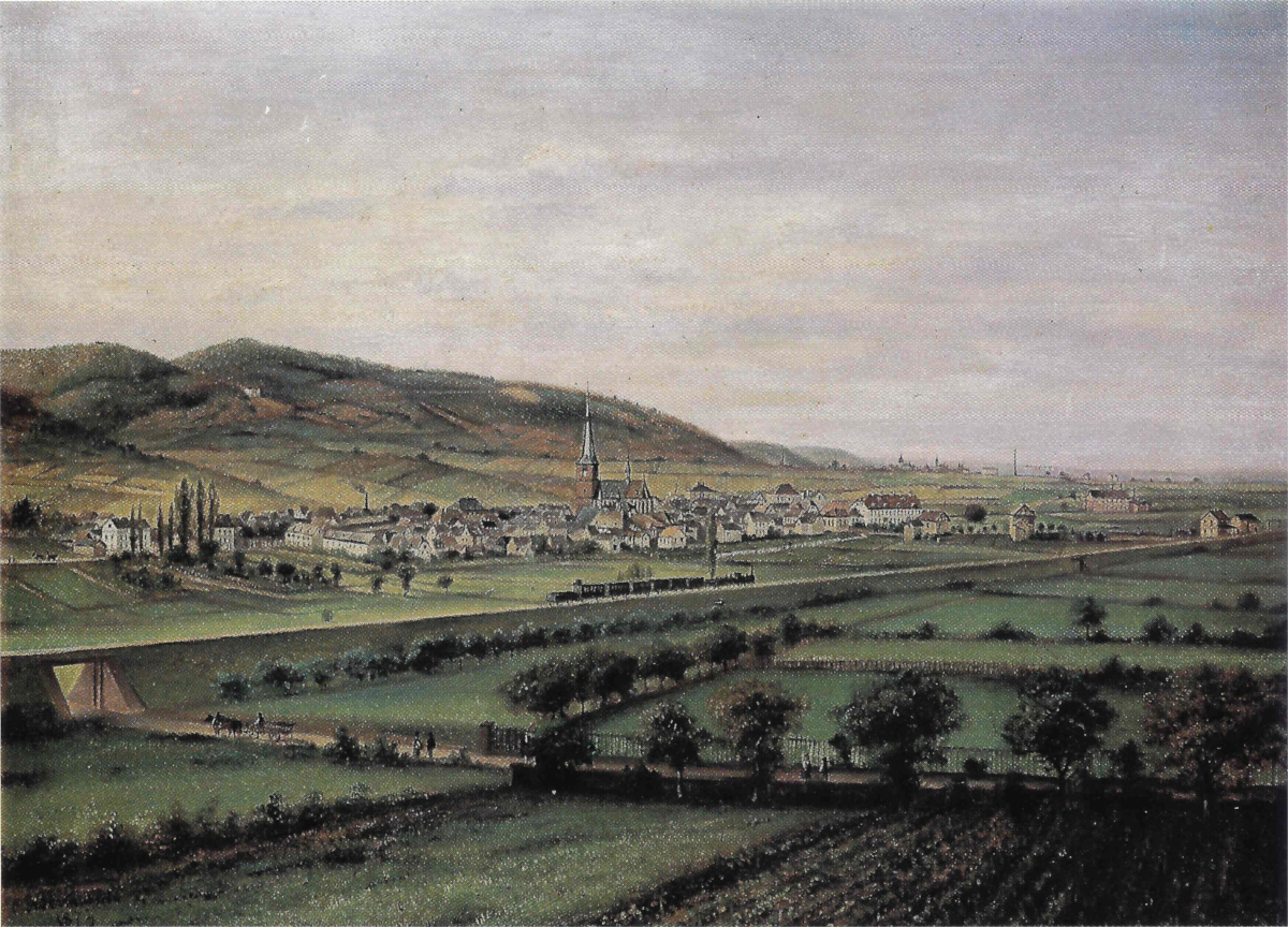 Ortsansicht von Deidesheim aus Richtung Südosten